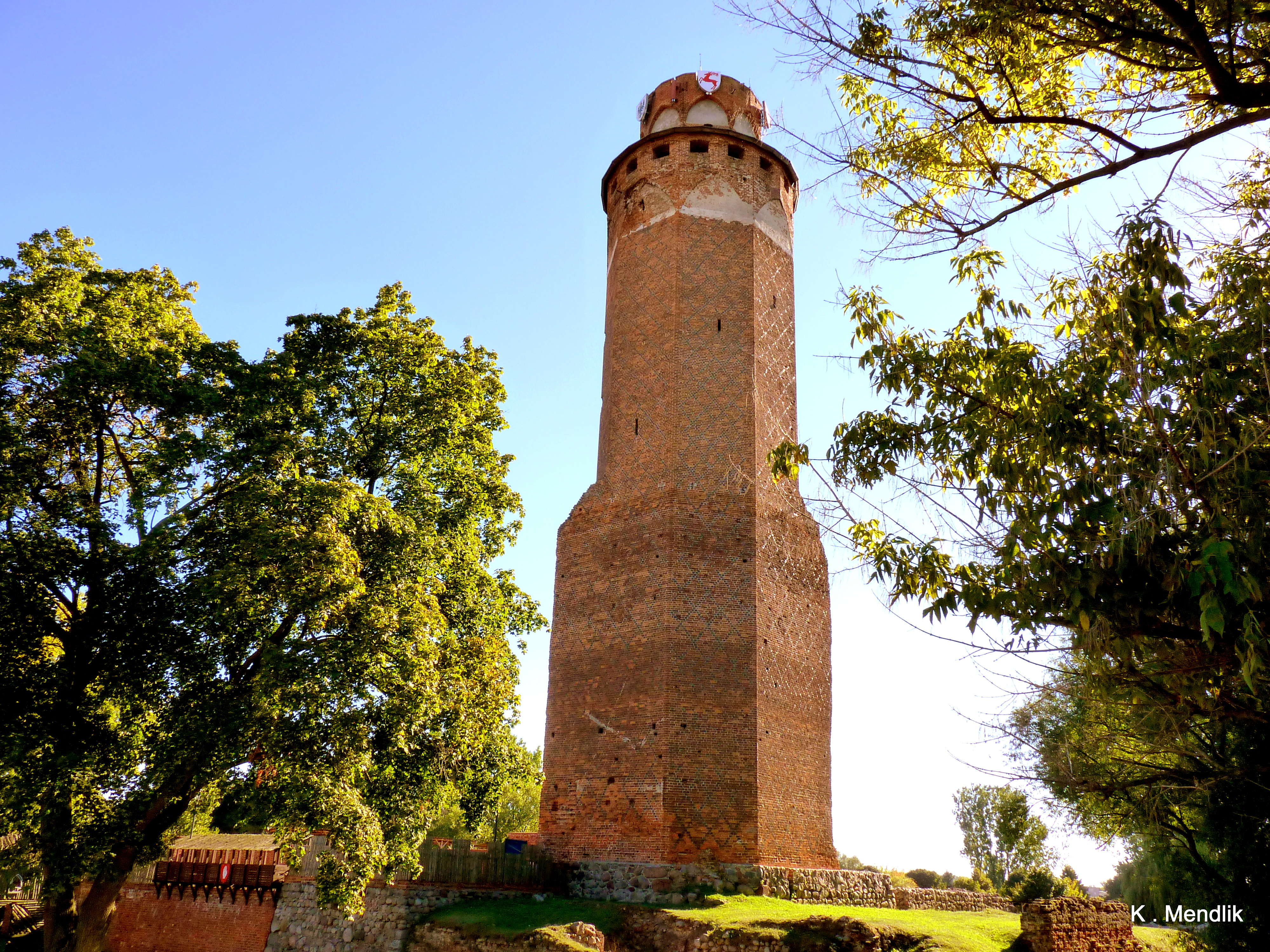 Wieża Zamku w Brodnicy, ma 12 kondygnacji i sięga wysokości 54 m.